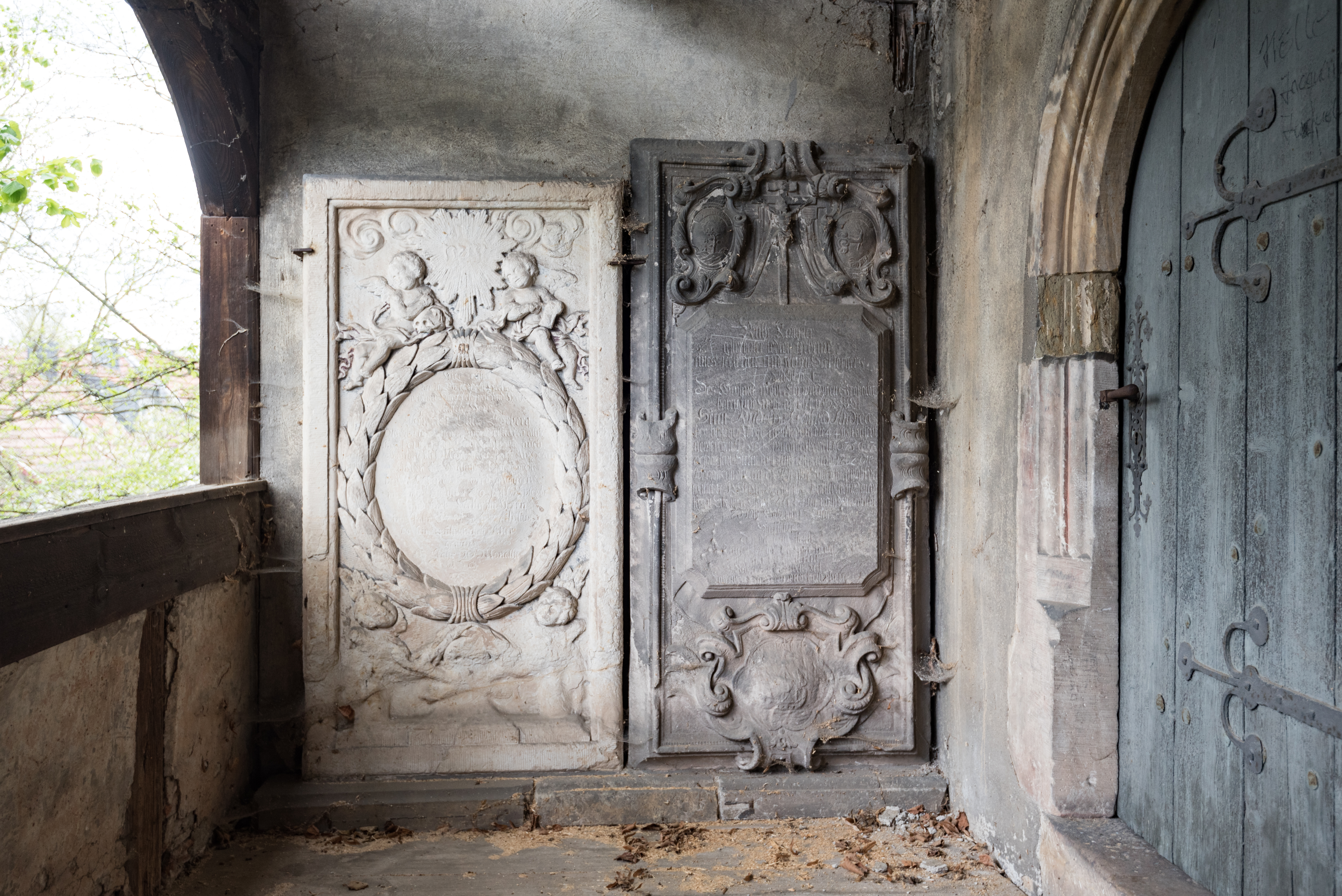 Sömmerda, Petrikirche